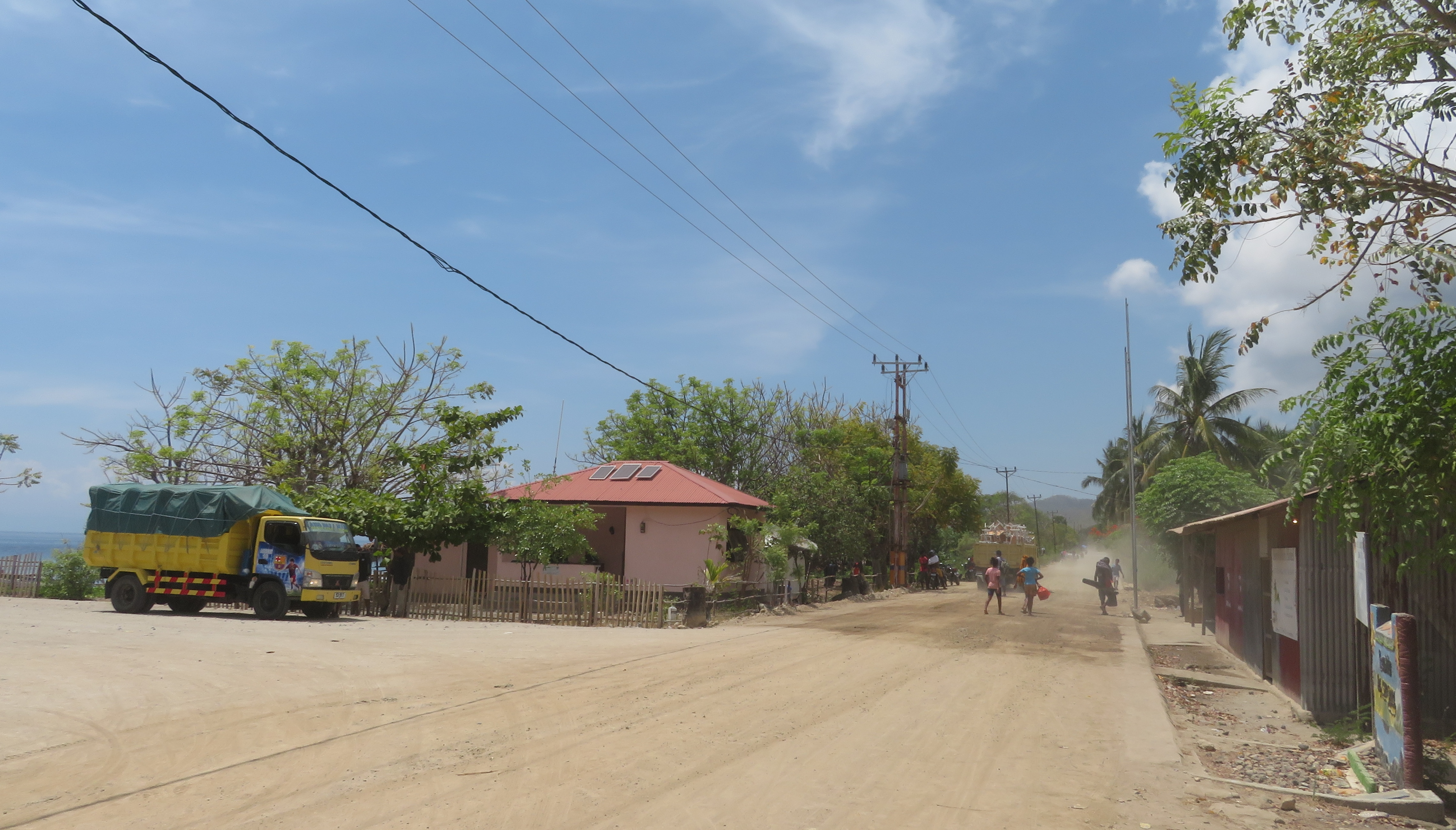 Hauptstraße in Beloi, Insel Ataúro, Timor Leste